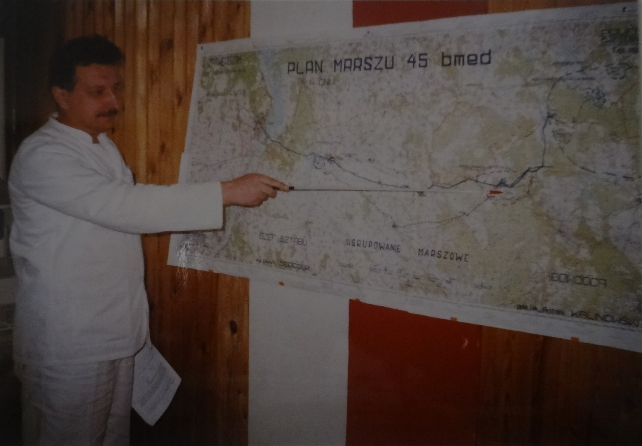 Dowódca 12 bm mjr lek. Zygmunt Brzuśmian